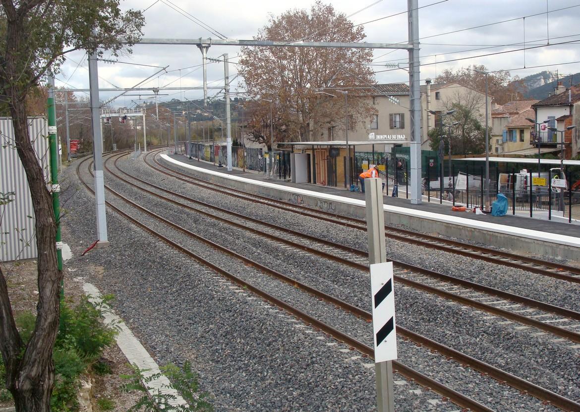 Vue d'ensemble de la nouvelle organisation de la gare de la Pomme : 3 voies, dont une seule à quai avec abri voyageurs.